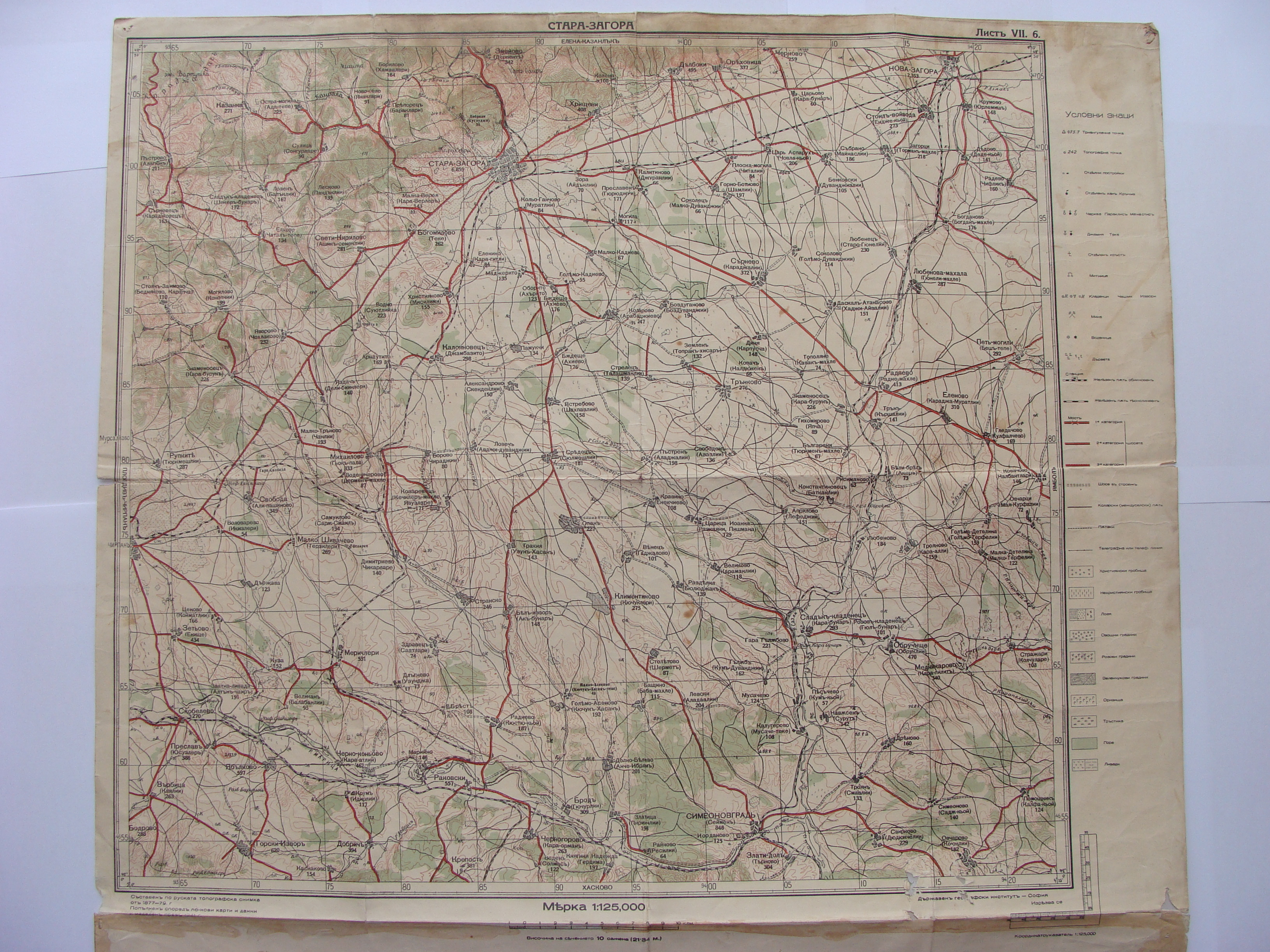 Историческа топографска карта съставена по руск топографска снимка 1877-1879 г., попълнена според по-нови карти и данни и публикувана през 1941 г.